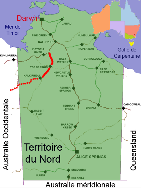 Tracé de la Buntime Highway dans sa partie Territoire du Nord